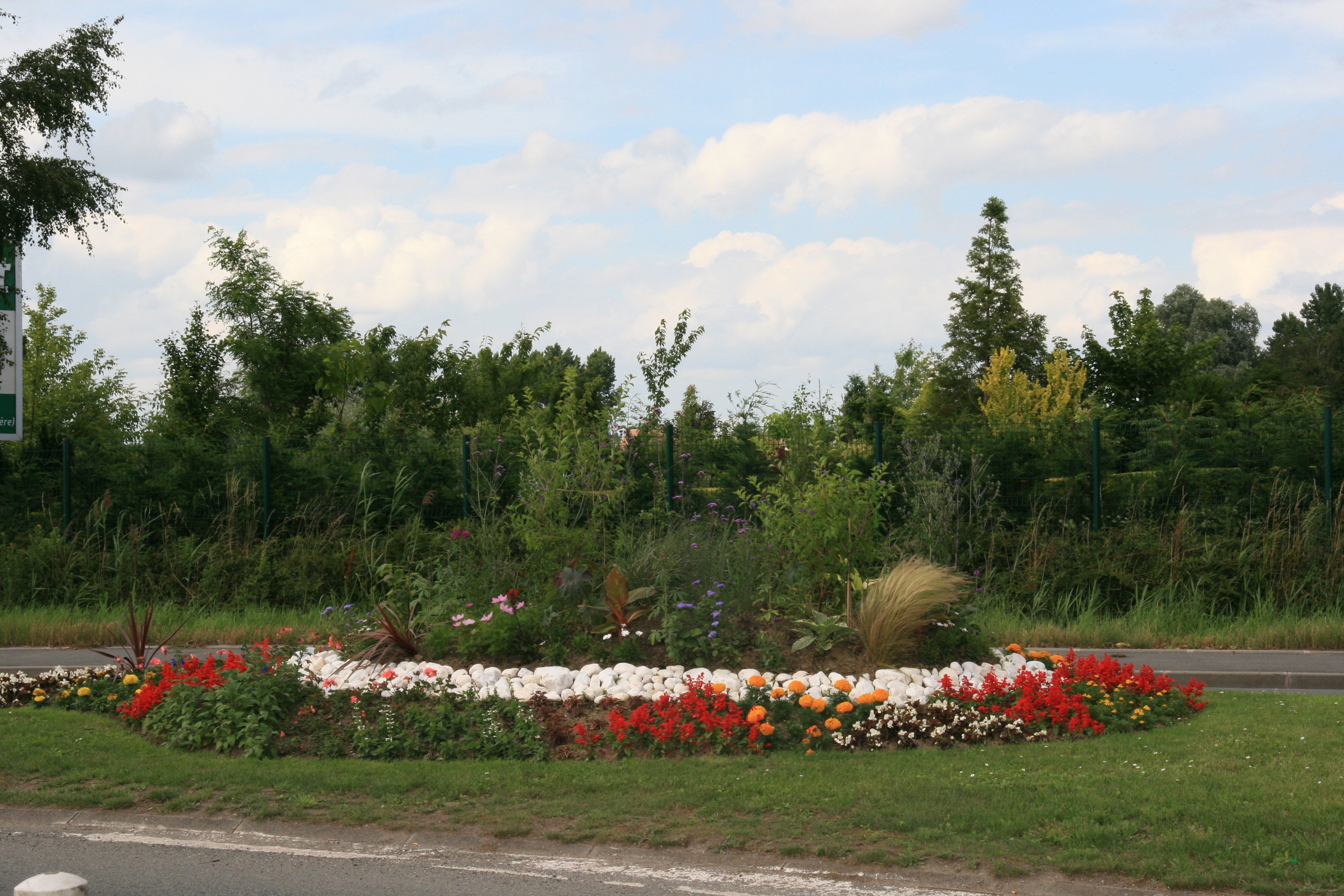 Photo prise en été 2007 par Johan BEN AZZOUZ